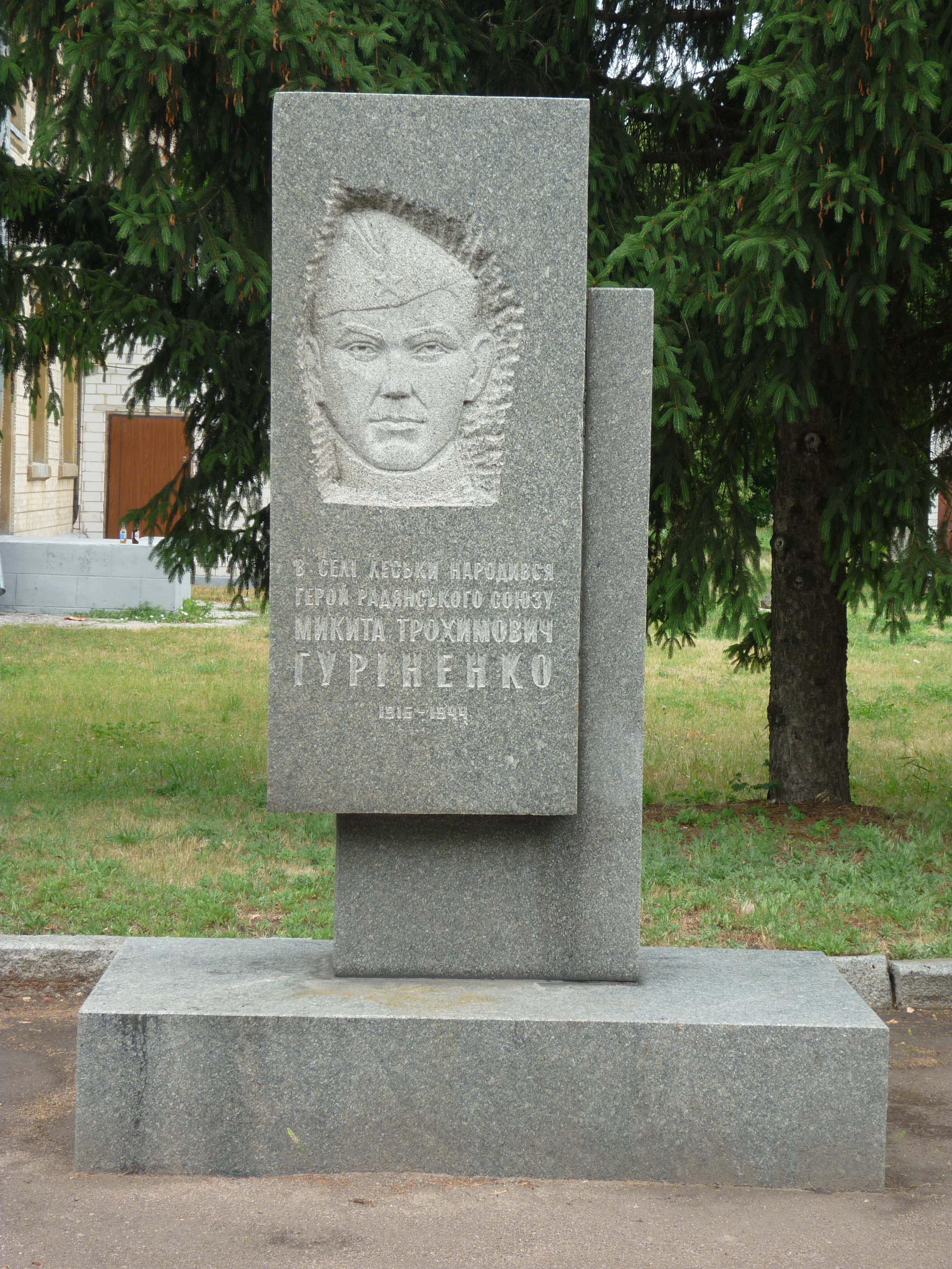 село Леськи Черкаського району Черкаської області, Україна